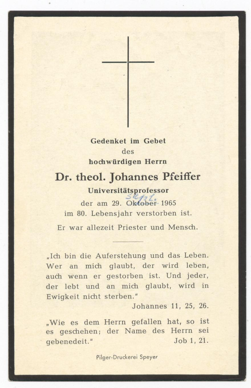 Professor Johannes Pfeiffer, Diözese Speyer, Sterbebildchen